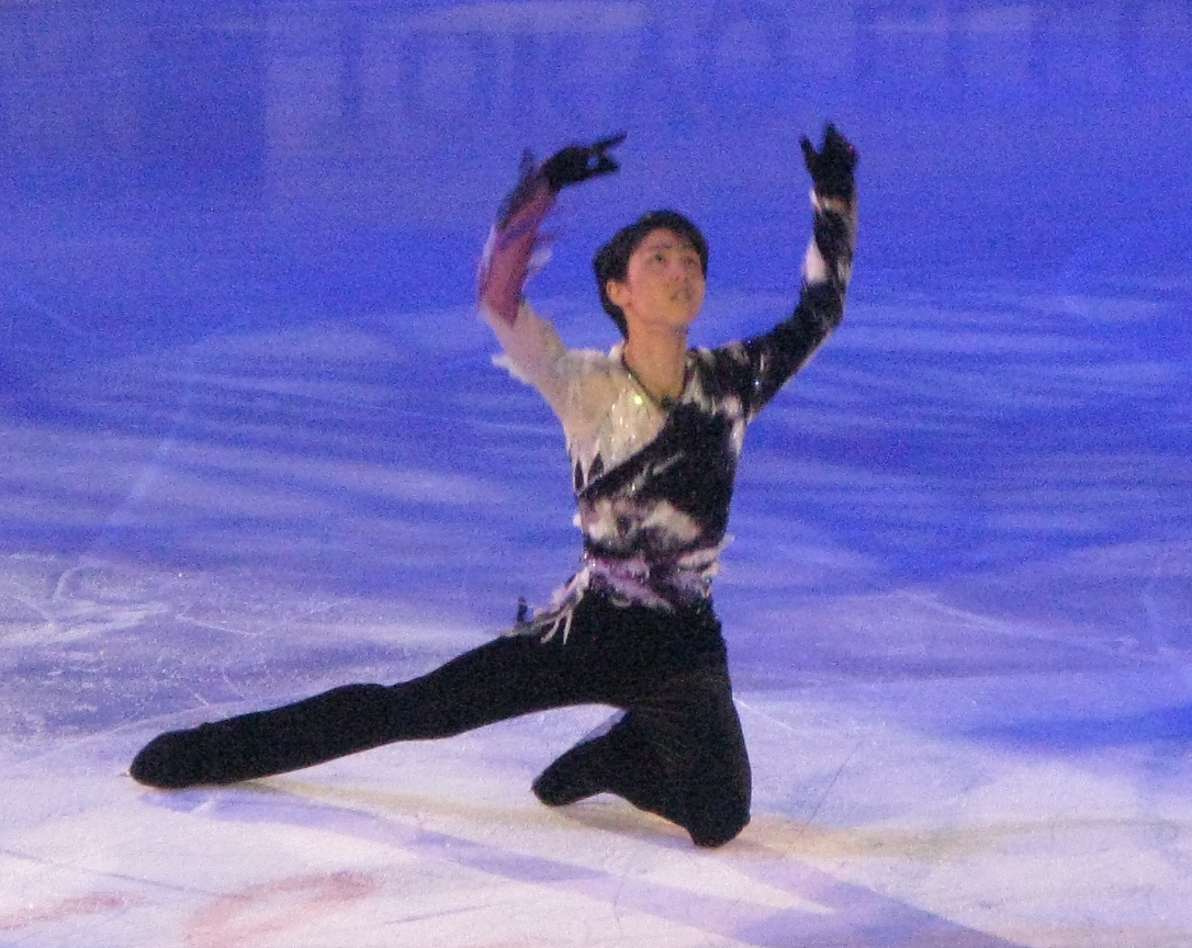 Yuzuru Hanyu au gala des Championnats du monde de patinage artistique 2012 à Nice.